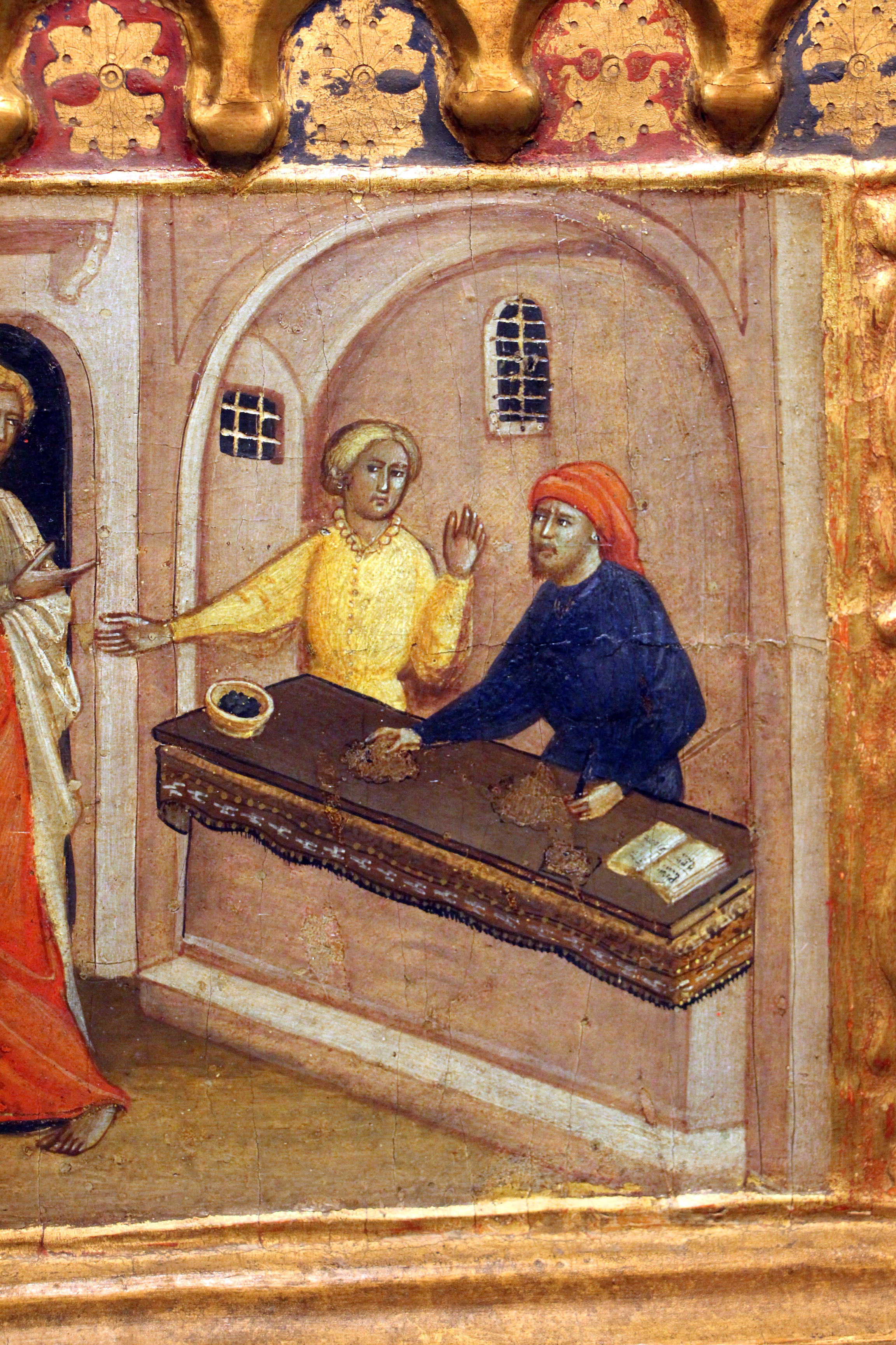 Museo civico (Prato) This is a photo of a monument which is part of cultural heritage of Italy.